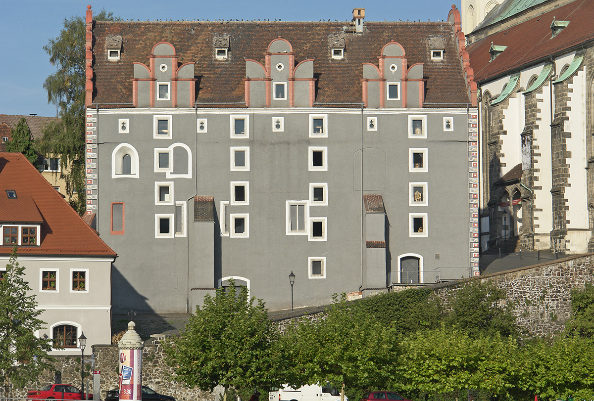 Görlitz, Waidhaus oder Renthaus (unterhalb der Peterskirche)